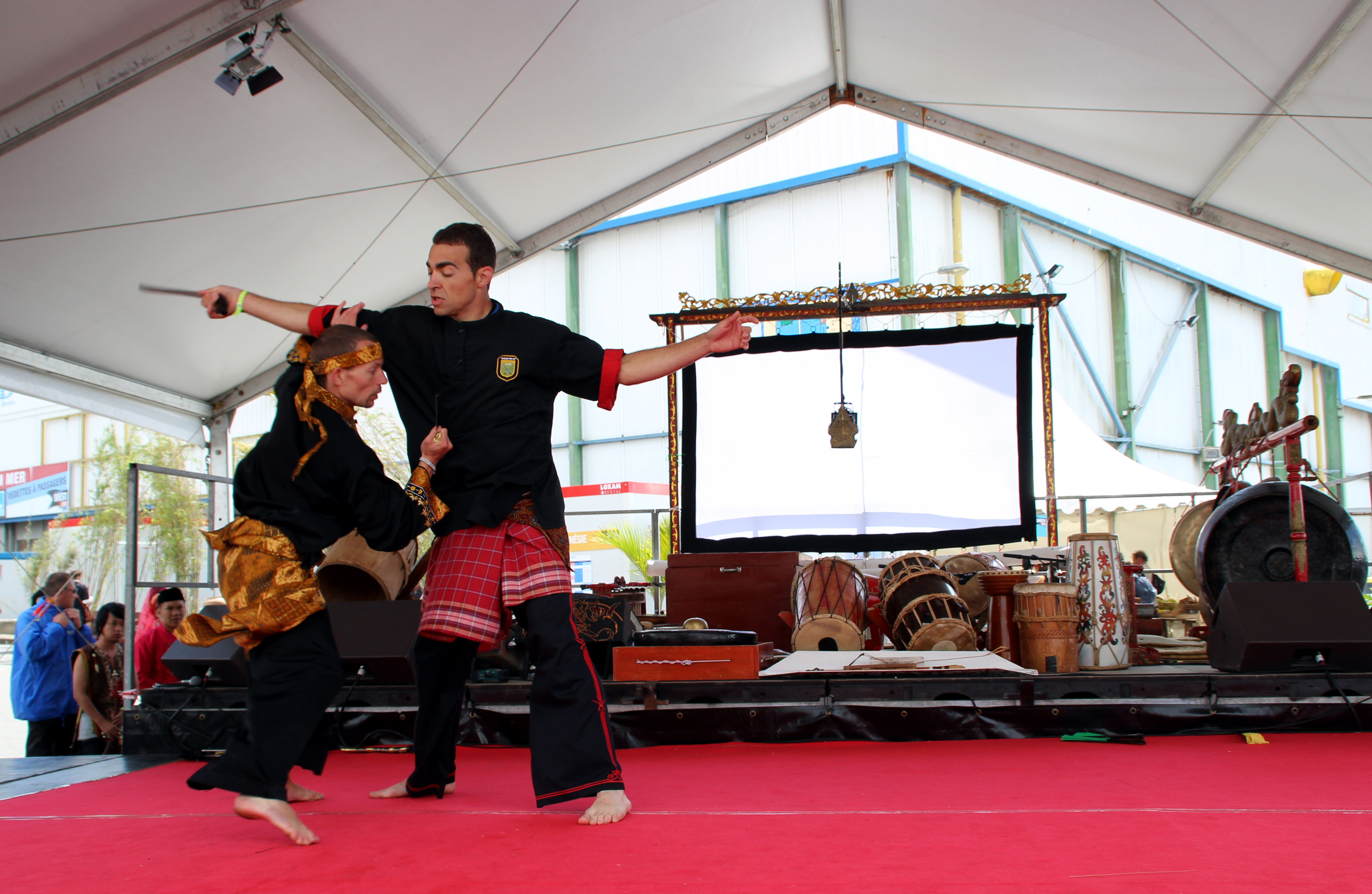 Tonnerres de Brest 2012 Pencak Silat Indonésie